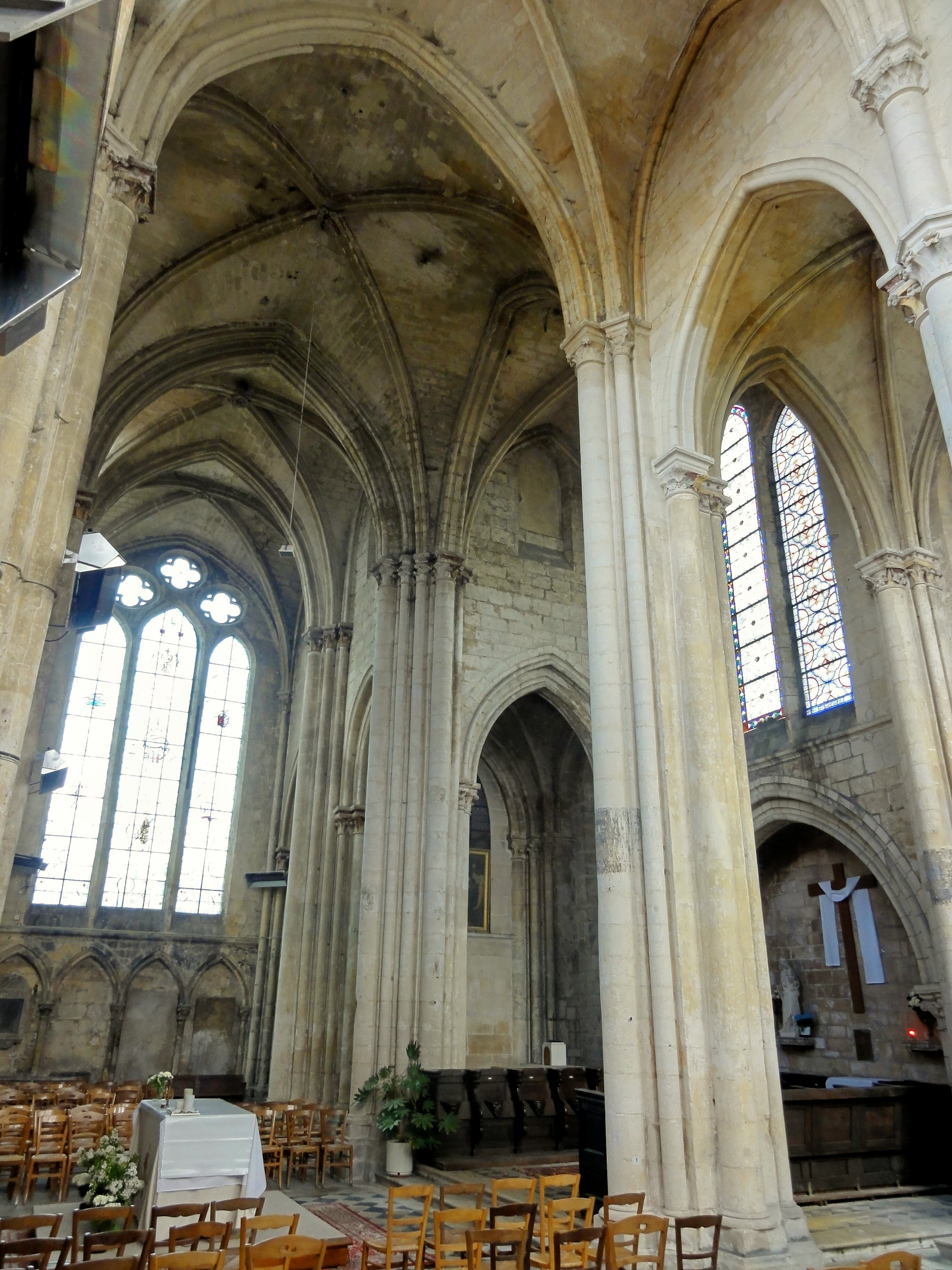 Vue diagonale vers le croisillon nord et la chapelle nord depuis le croisillon sud.